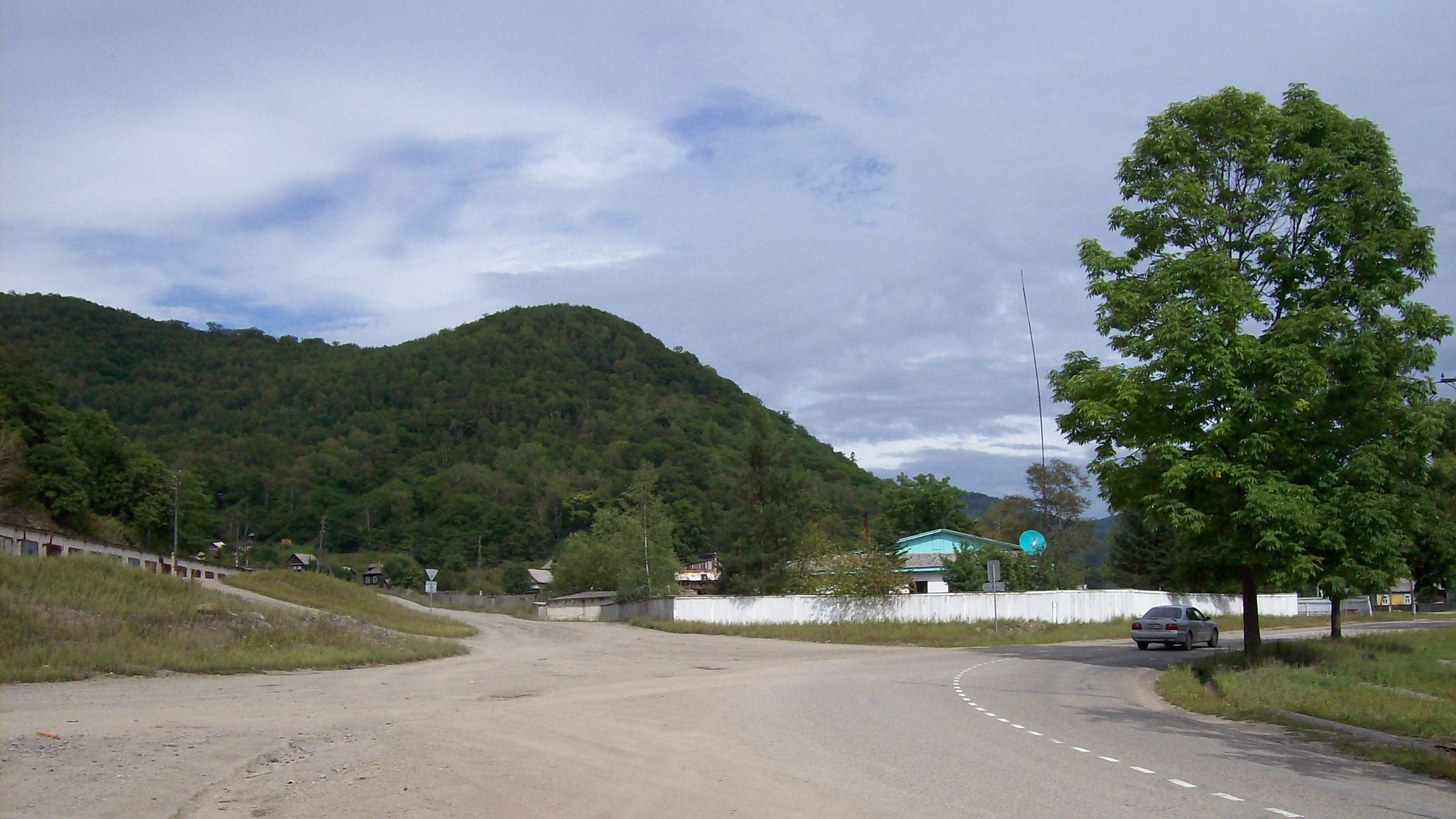 Дорога из Фабричного в Хрустальный